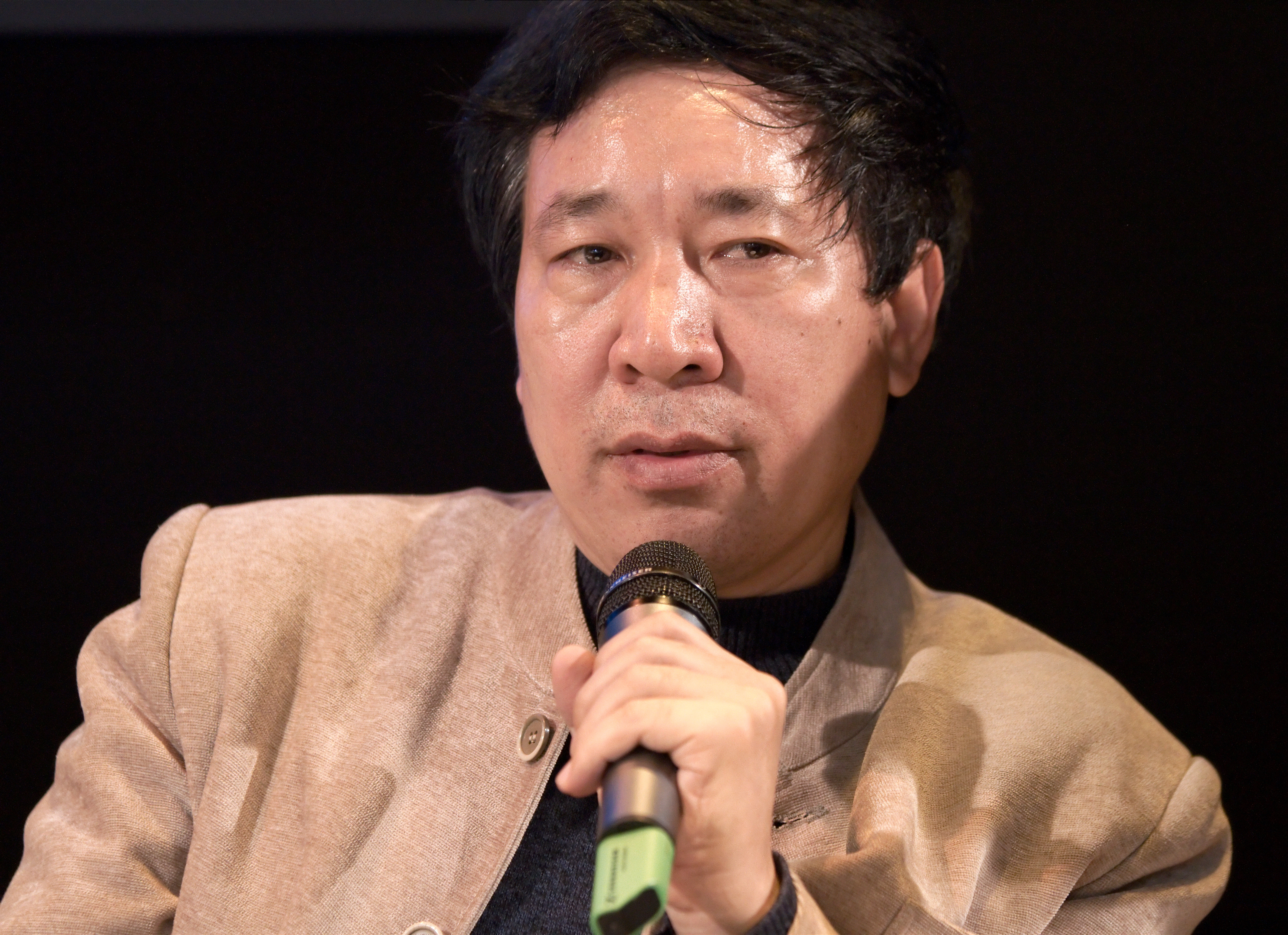 Yan Lianke au Salon du livre de Paris lors du débat L'exil ou la censure ?